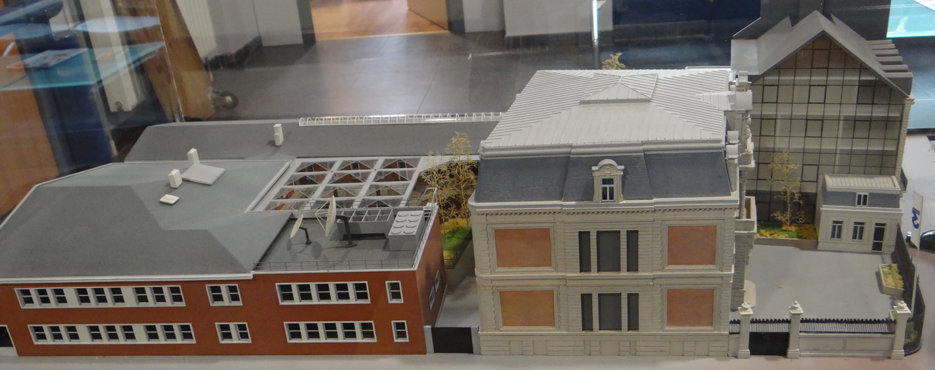 FR3 Nord Pas-de-Calais Maquette